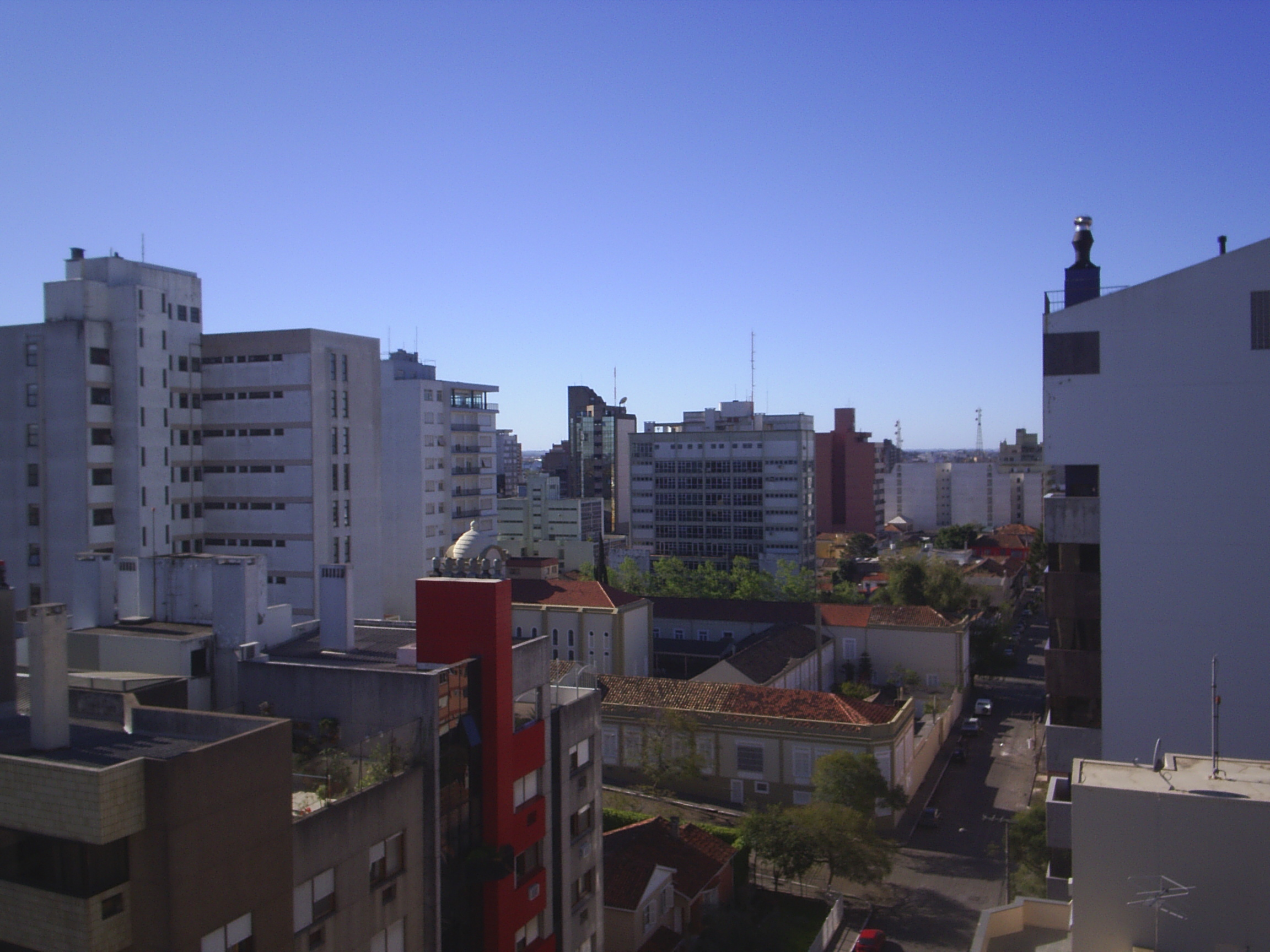 Centro de Pelotas- Brasil